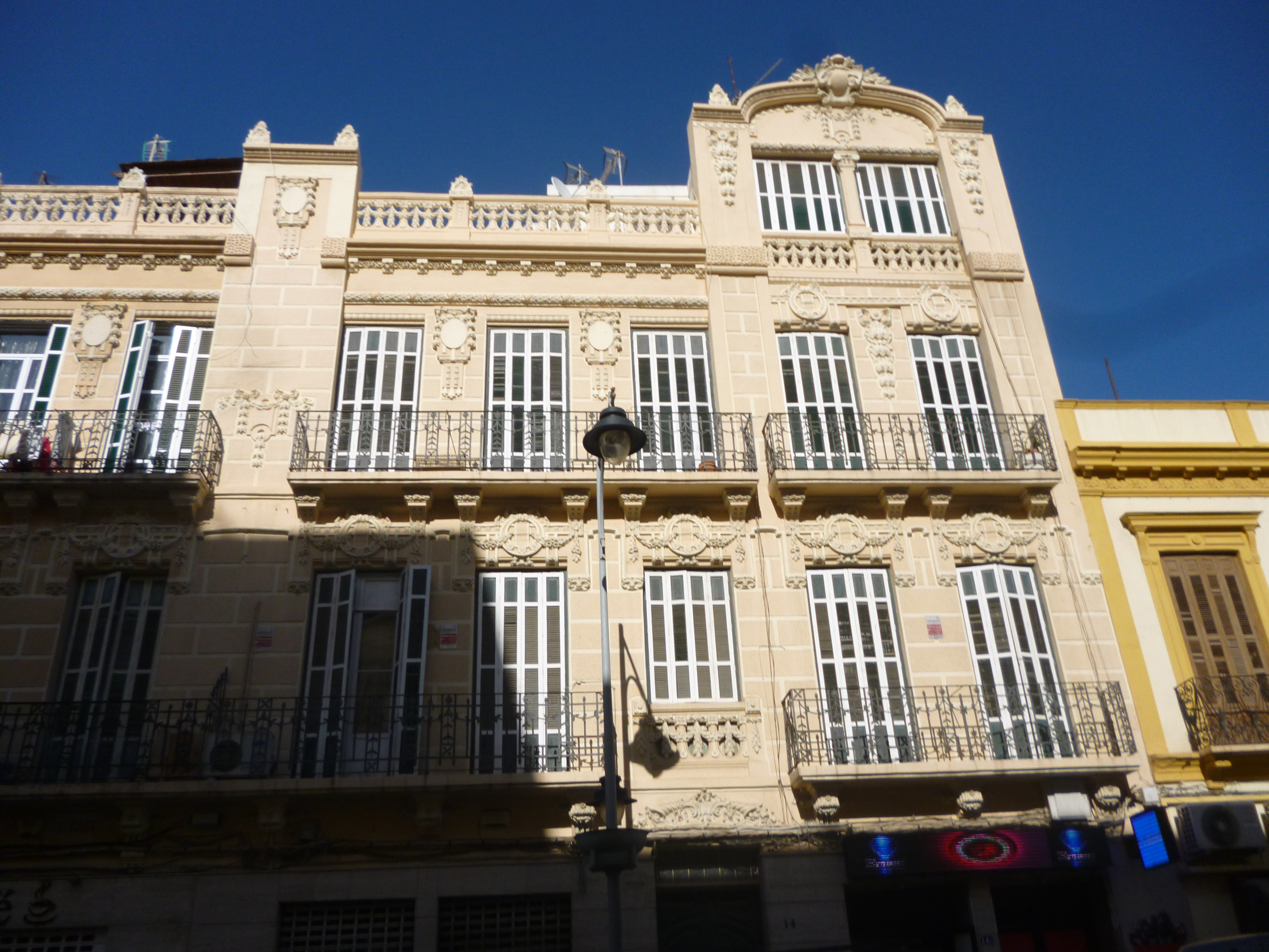 O´Donnell 14, 16